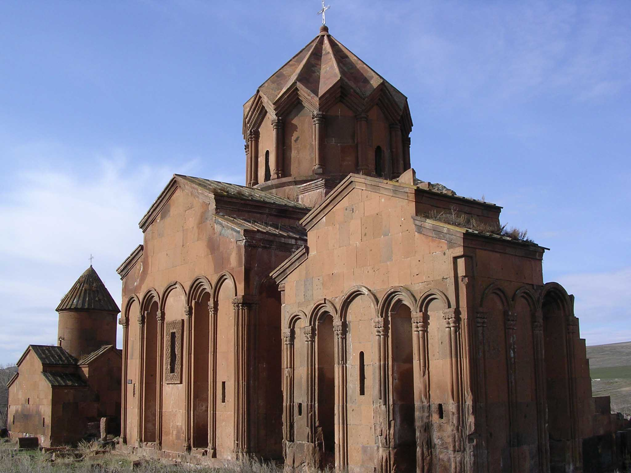 Monastère de Marmashen